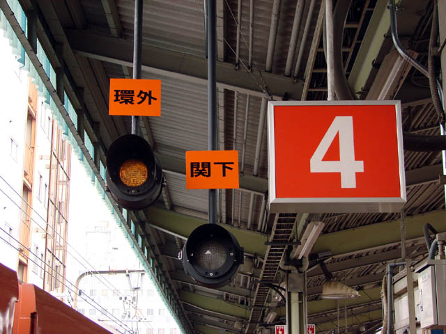 新今宮駅４番線出発反応標識